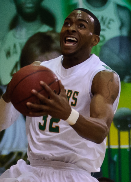 32, Ike Udanoh (Detroit, Mich.)